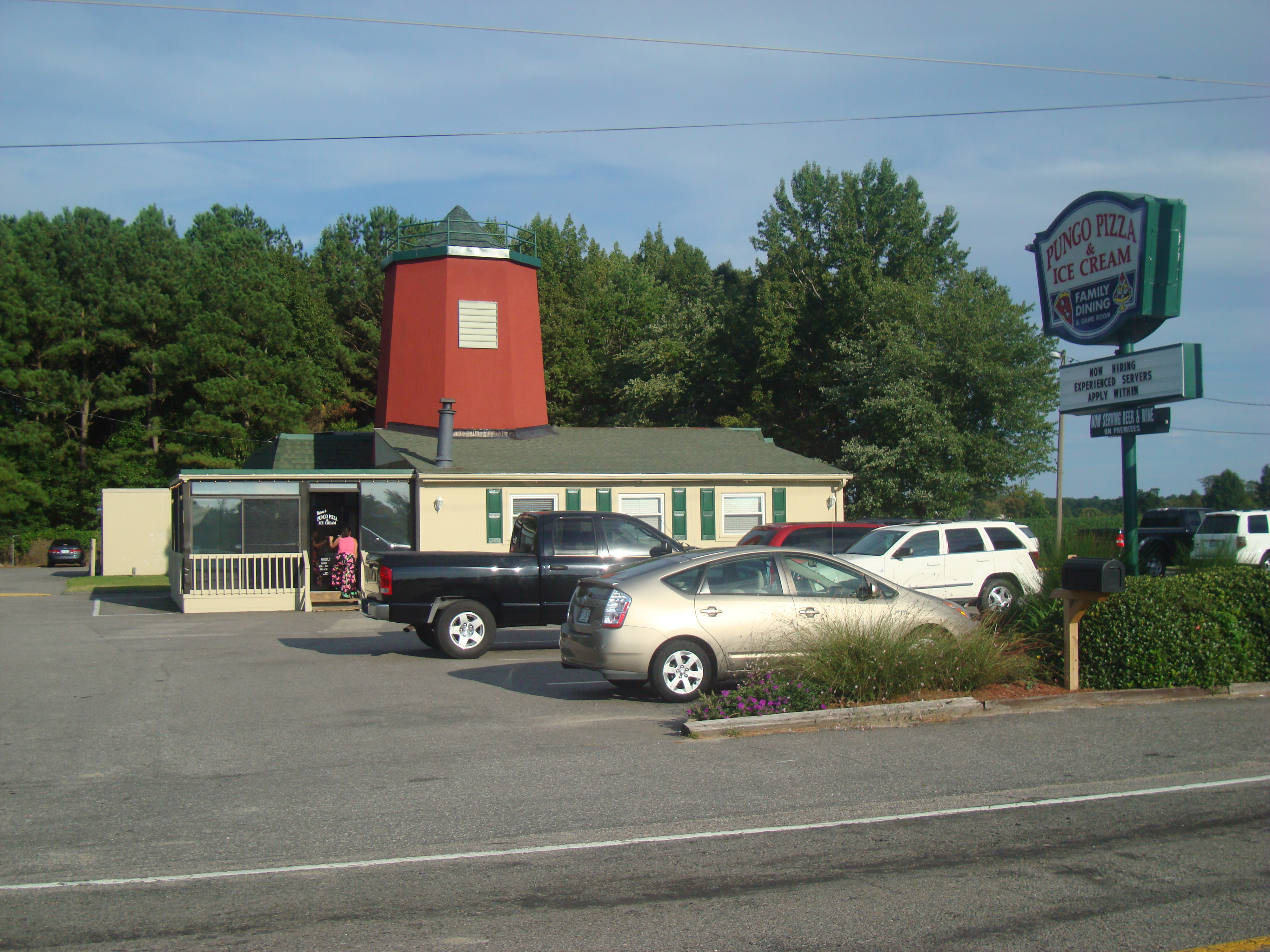 Pungo Pizza and Ice Cream Parlor in Pungo, Virginia.